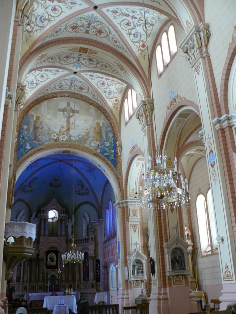 Костёл св. Михаила Архангела (фасад), Белогруда, Лидский район, Фото путешествия по Беларуси.